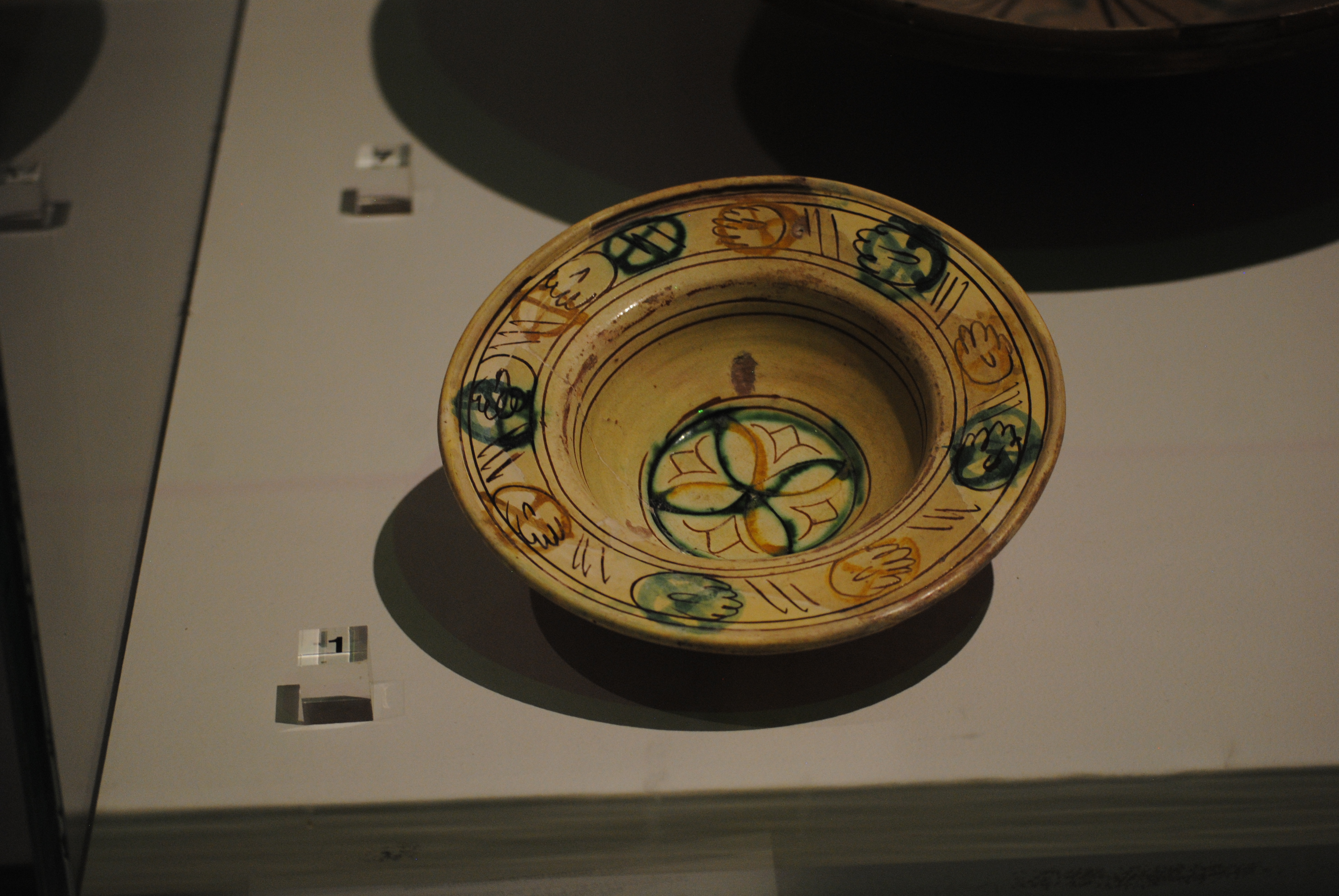 Scodella ingobbiata e graffita a punta della prima metà del XVI secolo (apartenente alla collezione Tongiorgi, Pisa) - Museo nazionale di San Matteo.